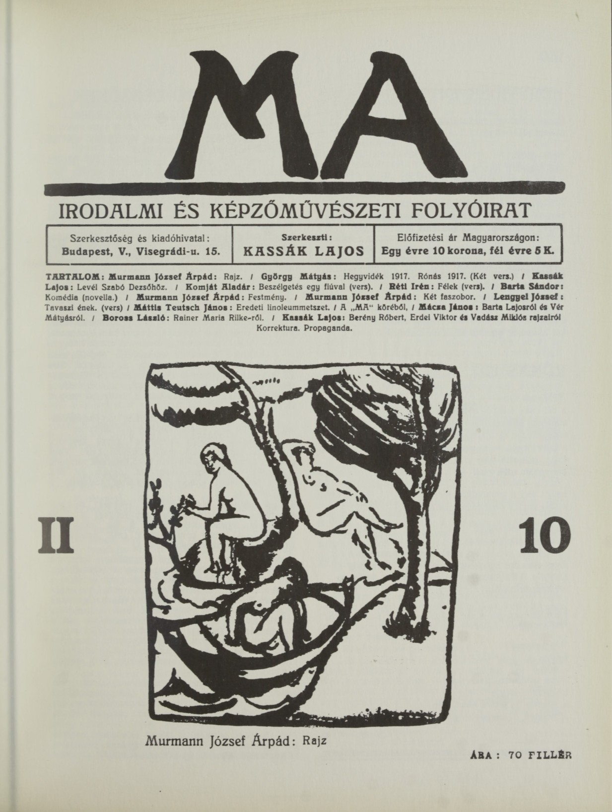 József Árpád Murmann Rajz (Zeichnung) Zeitschrift MA, Heft 10 1917